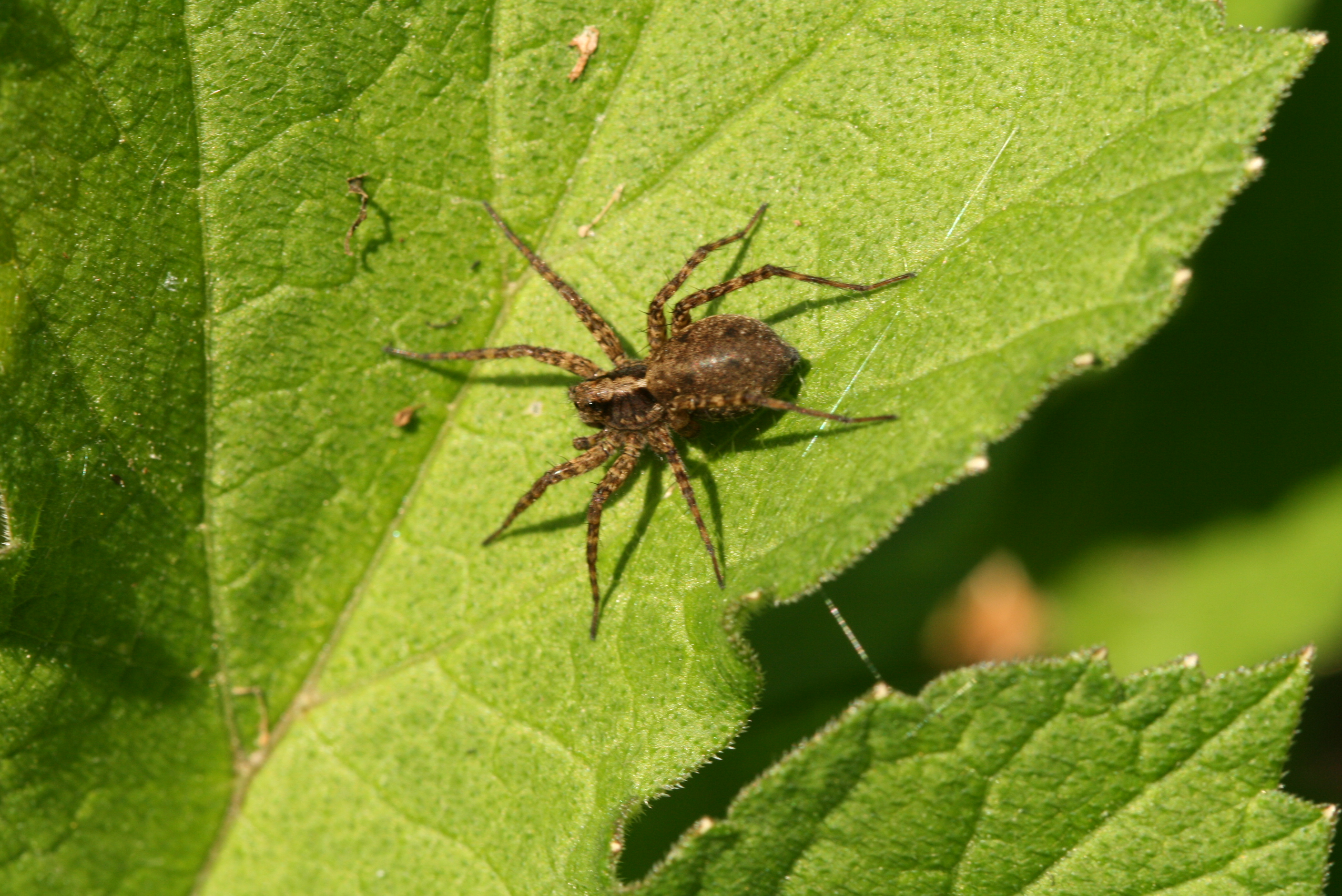 Pardosa agricola - Belgique - Hainaut